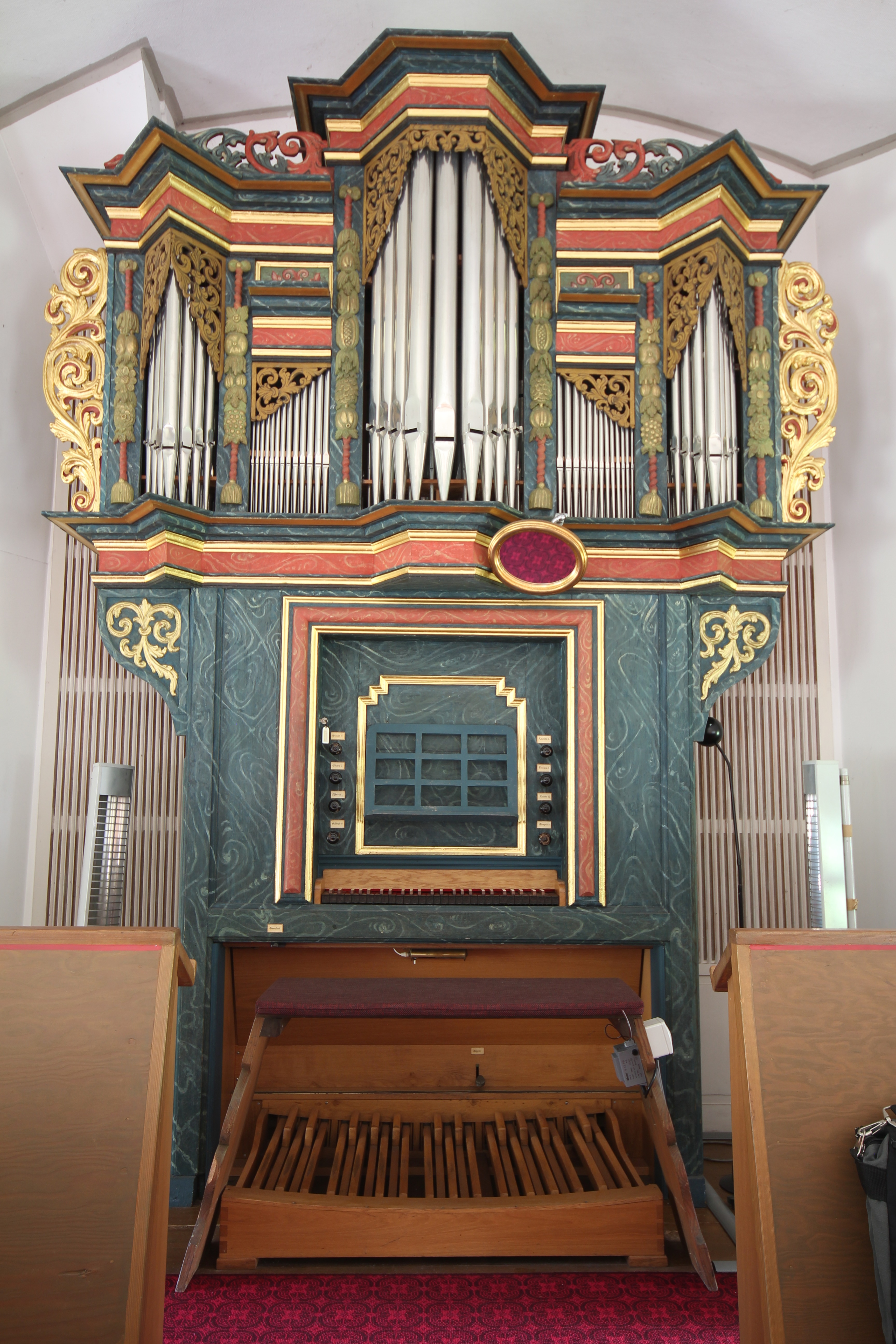 Orgel der evangelischen Kirche zu Solms-Albshausen (Gehäuse und Windlade des Manuals von Georg Philipp Dreuth um 1750, sämtliches Pfeifenwerk von Günther Hardt, 1982)